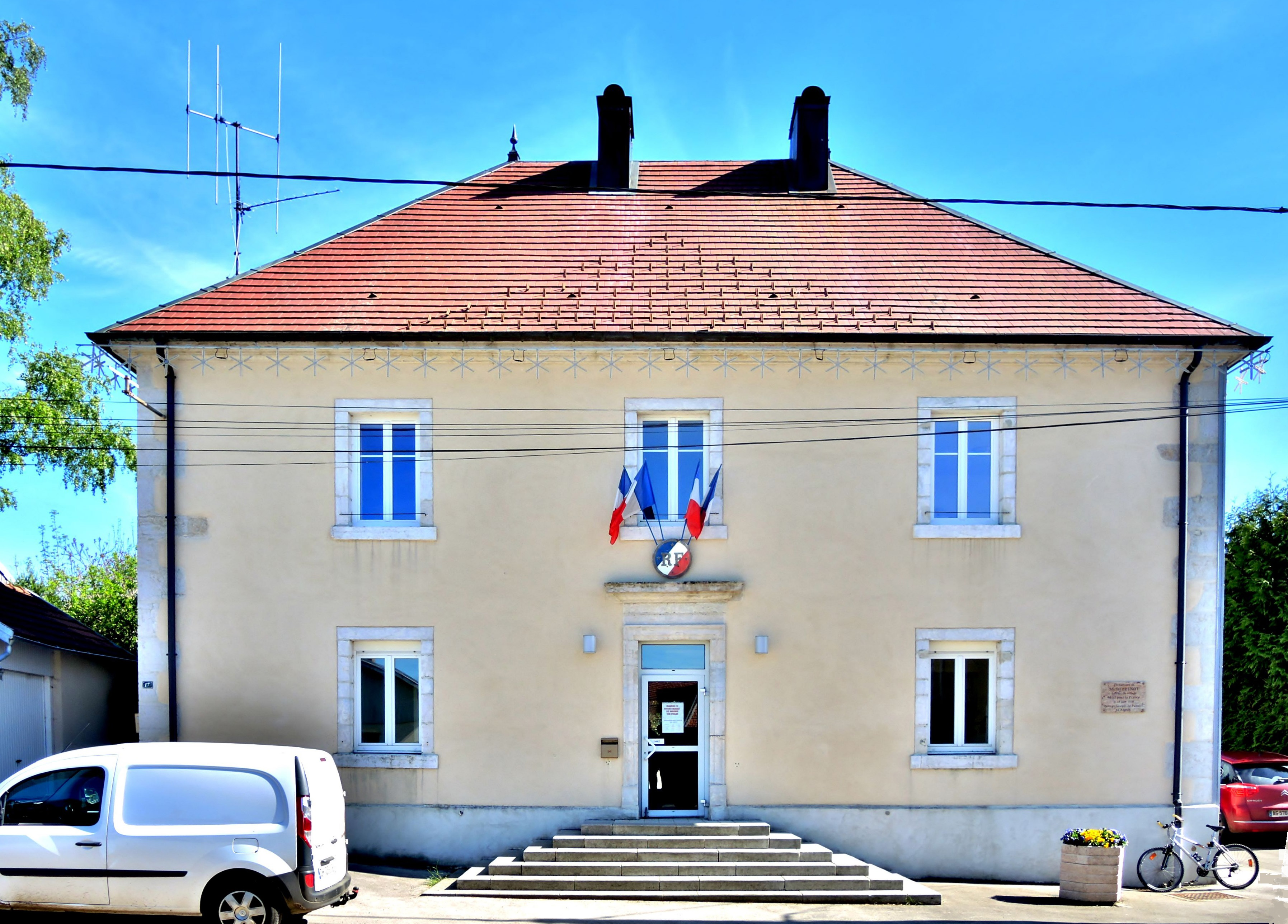 Mairie du village de Germéfontaine. Doubs